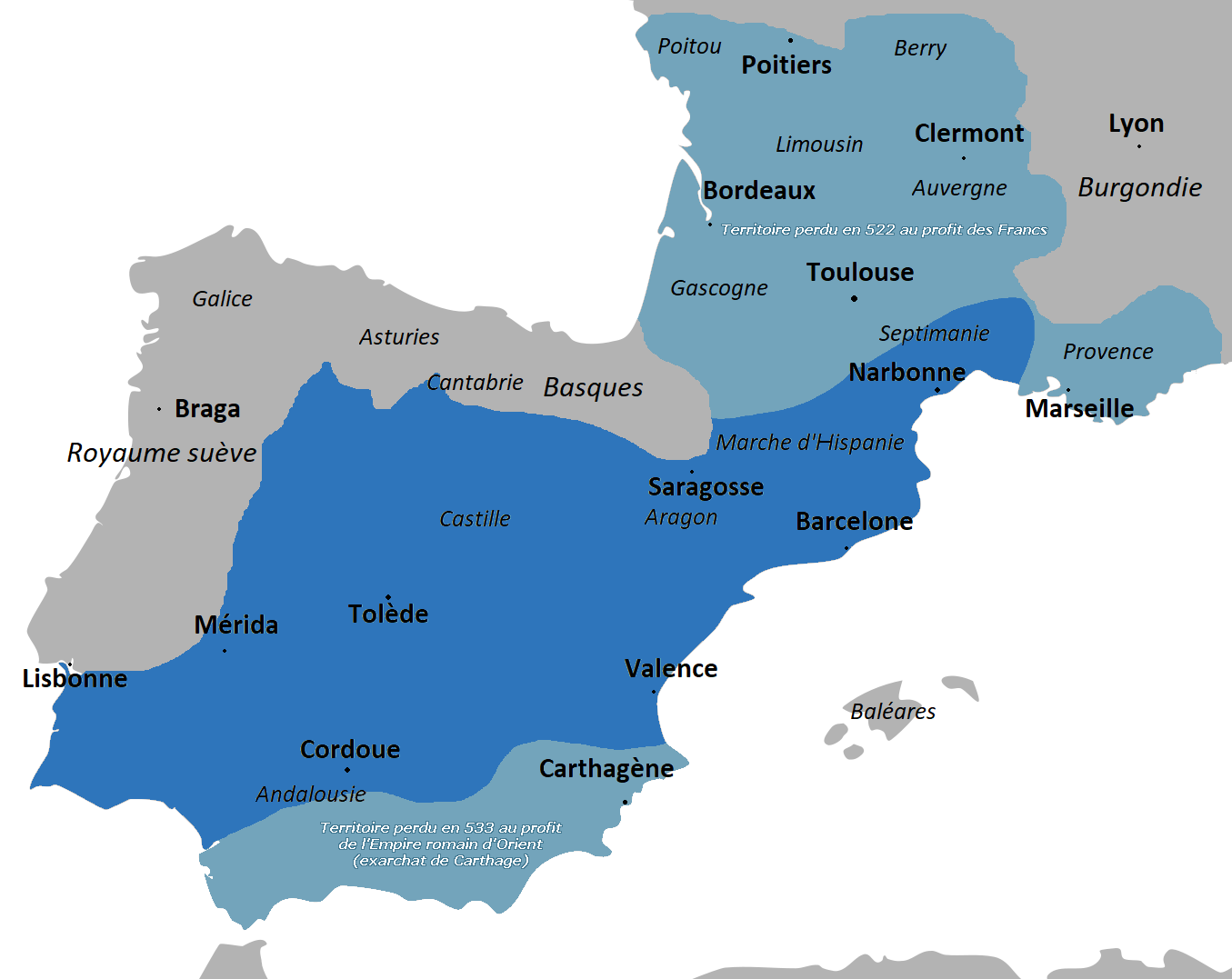 Royaume wisigoth sous Alaric II et ses successeurs.